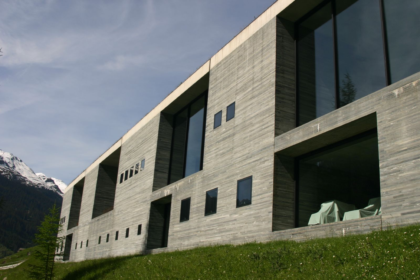 Therme_Vals, Vals, Graubünden, Switzerland. Architect : Peter Zumthor.